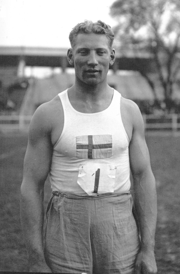 Jean Bouin : meeting international : Anderson, 1er du lancer de disques : [photographie de presse] / Agence Meurisse